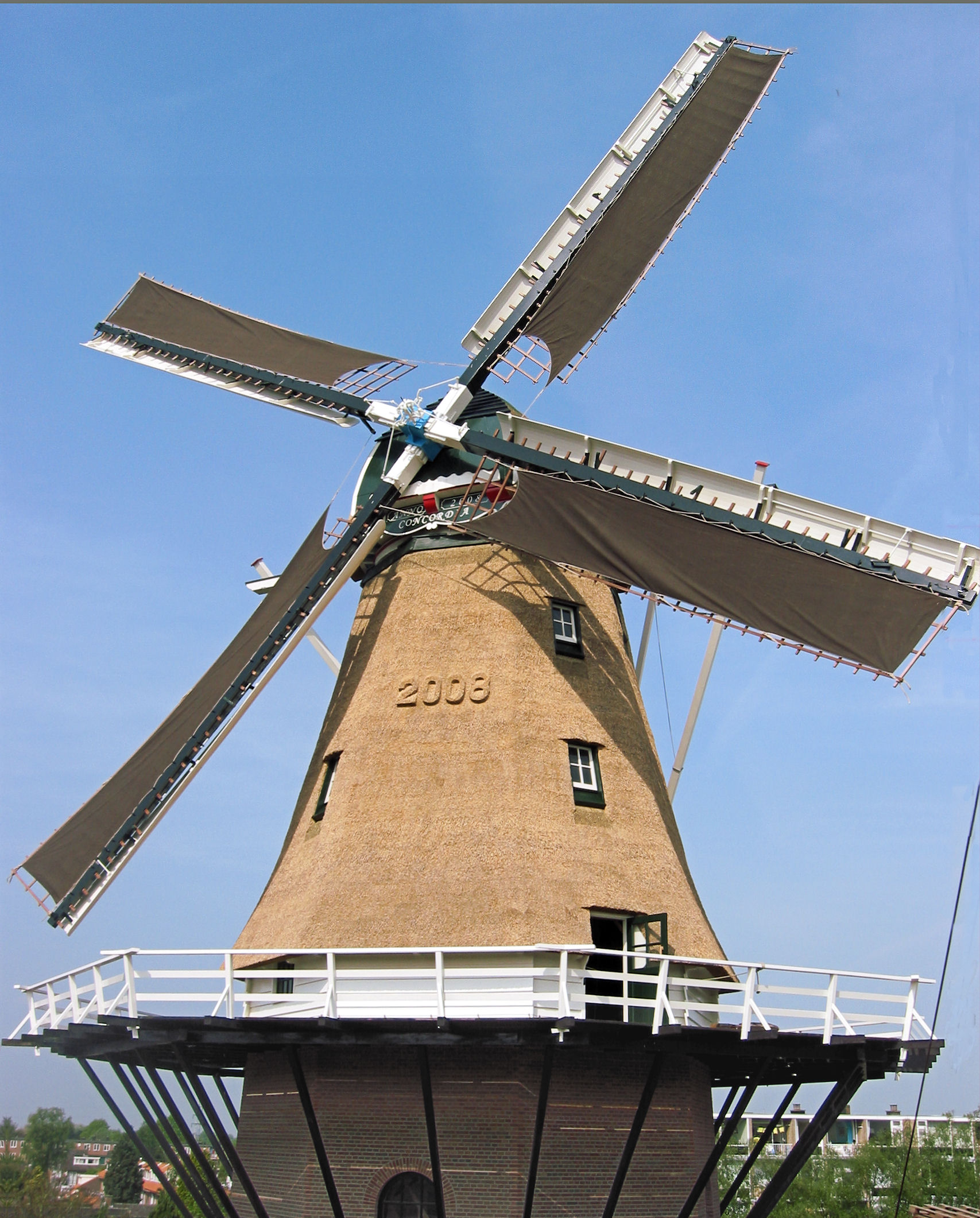 Concordia molen te Ede